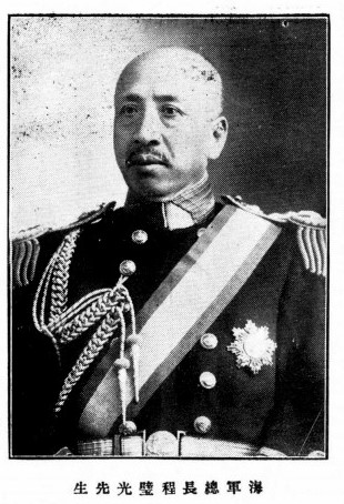 程璧光肖像